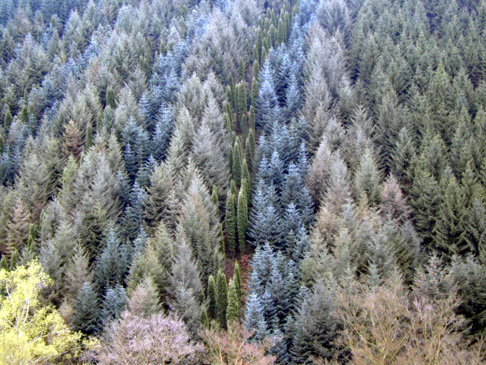 Ansicht im Staatsforst Burgholz (Arboretum), Wuppertal